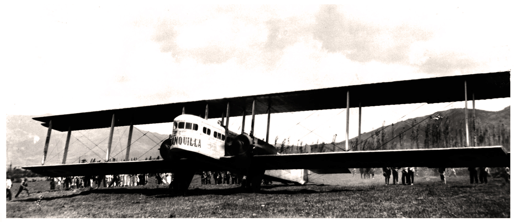 Farman F.60 de la "Compañía Colombiana de Navegación Aérea". Farman F.60 Goliath "Barranquilla" de la CCNA